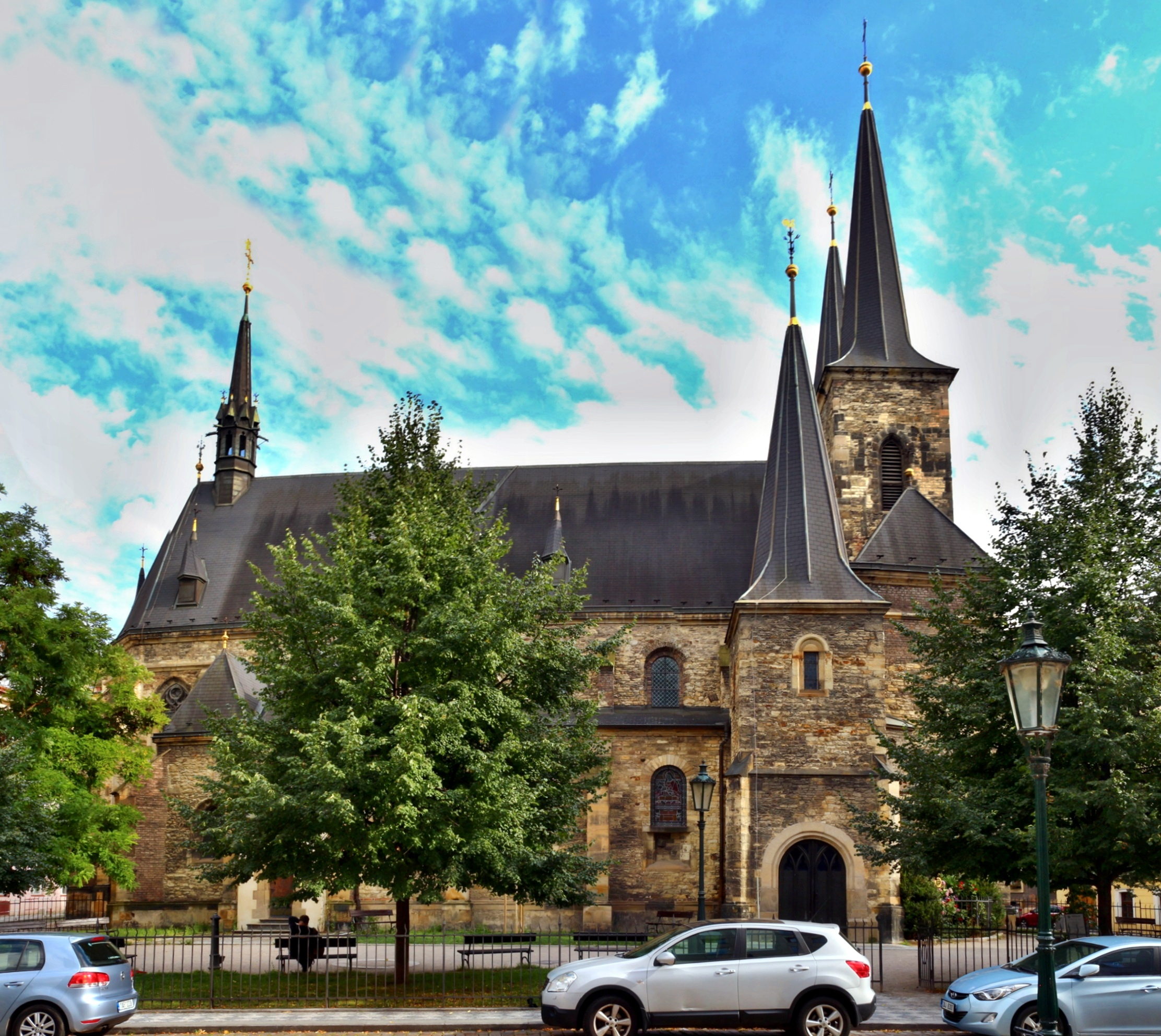 Kostel svatého Petra Na Poříčí